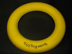 Spielgerät beim Ringtennis